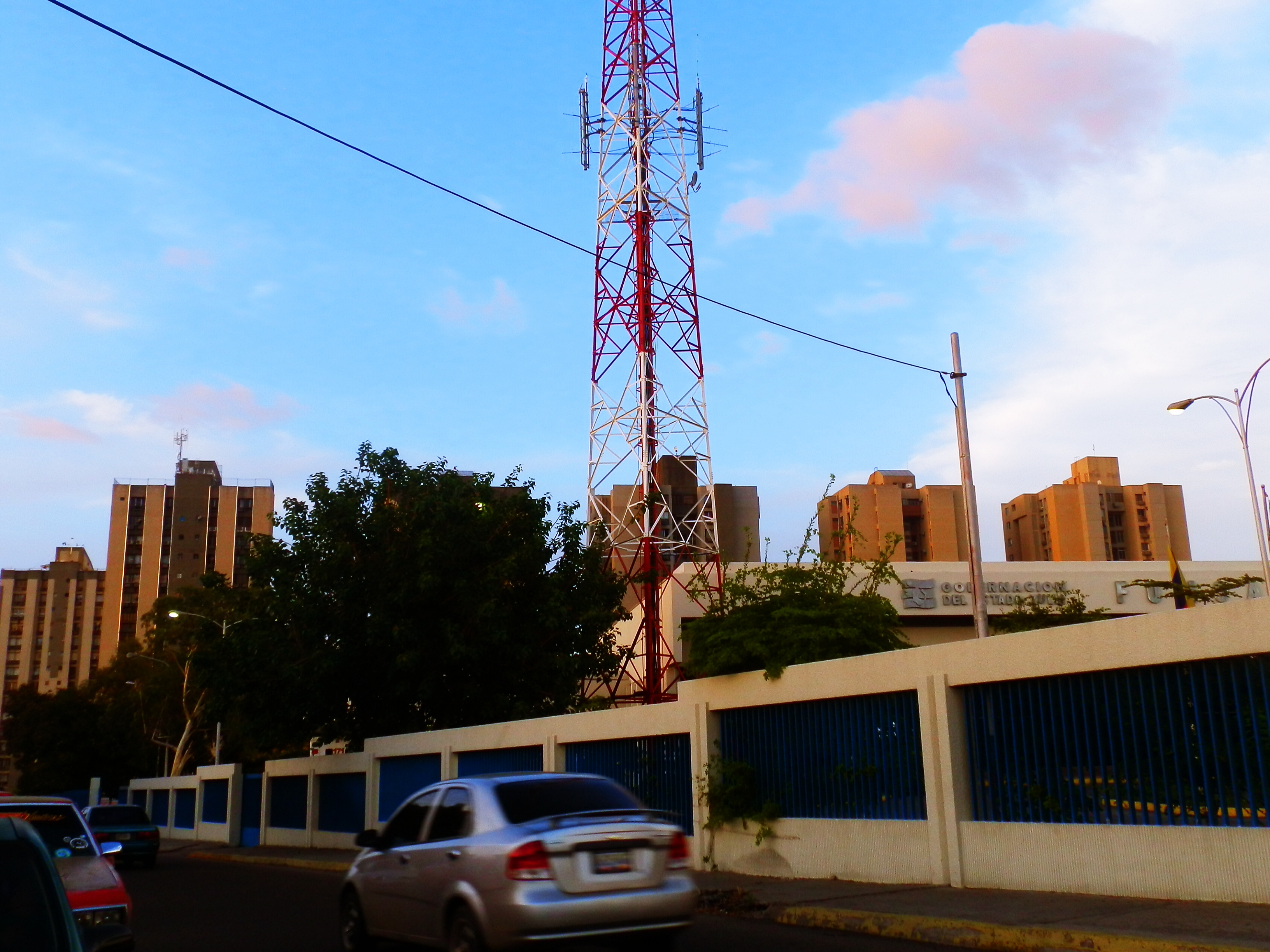 Edificios en la calle 70, Maracaibo, Venezuela